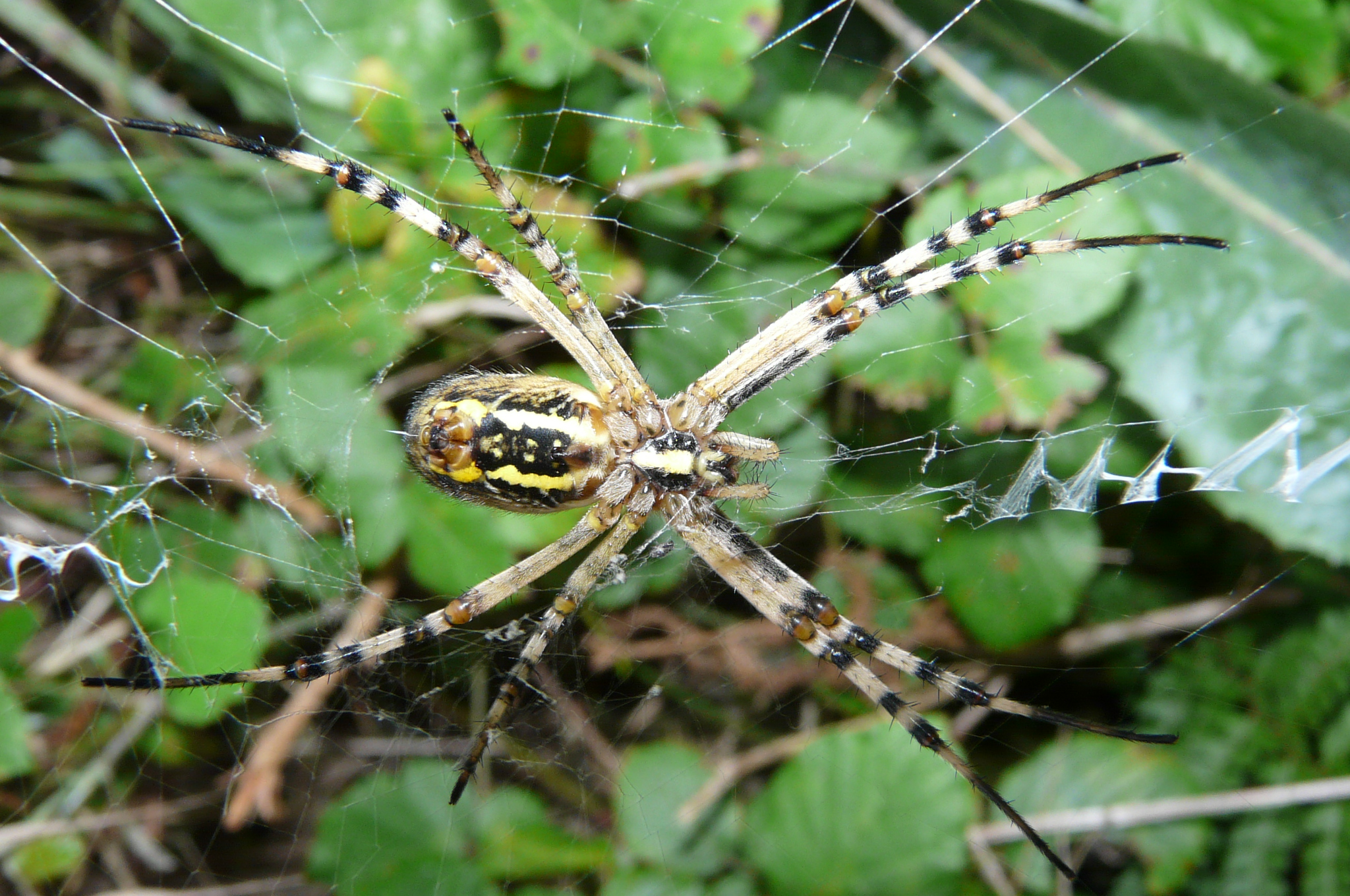 Vista ventral de una araña tigre (Argiope bruennichi) hembra. Nótese el órgano genital en el centro del vientre y las hileras en el extremo del abdomen. Rioseco, Asturias.